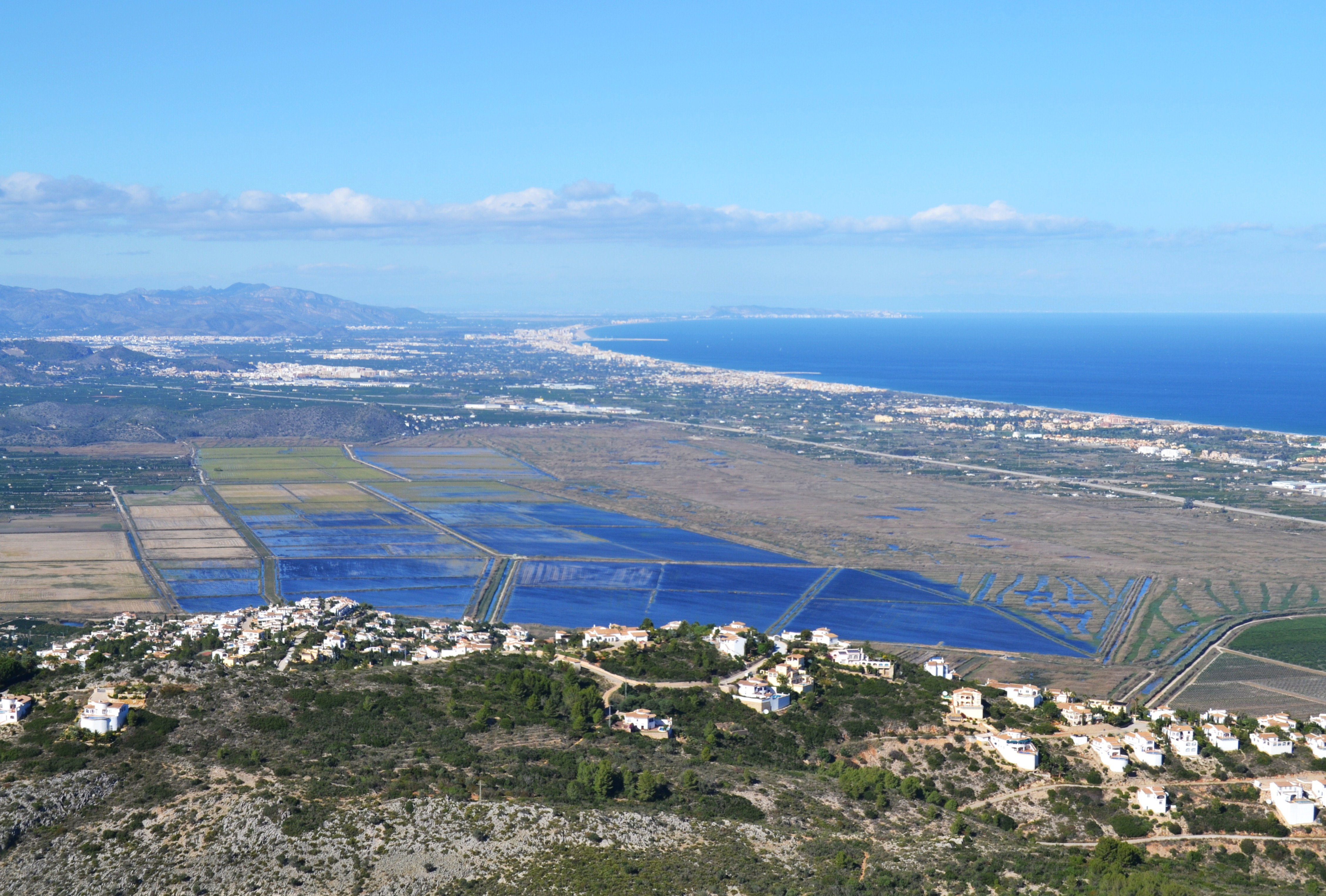 Marjal de Pego des de la serra de Segària.